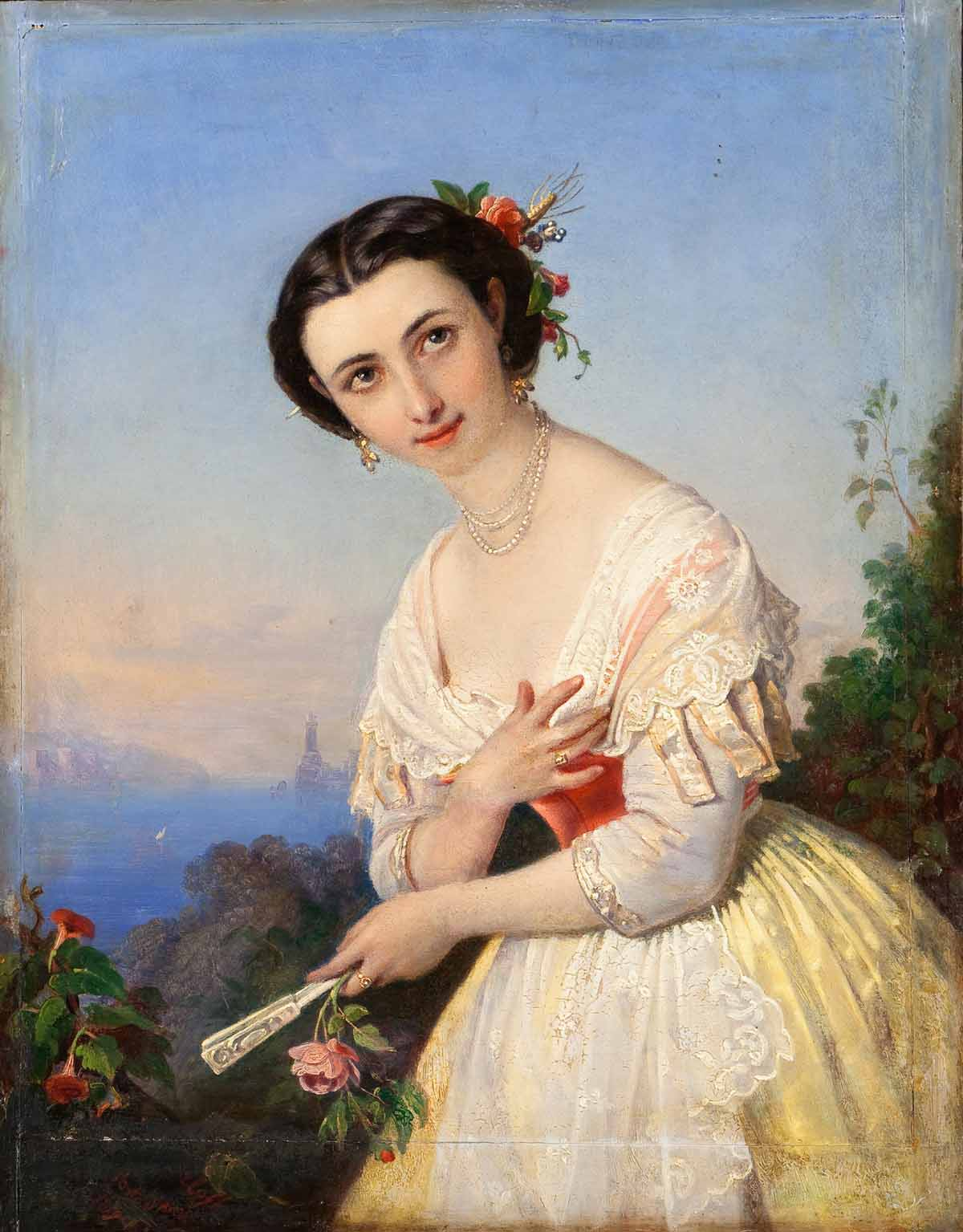 Девушка с веером (портрет Домники Ивановны Щулепниковой (ум. 1889)